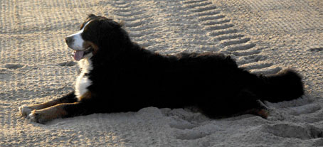 Boyero de Berna